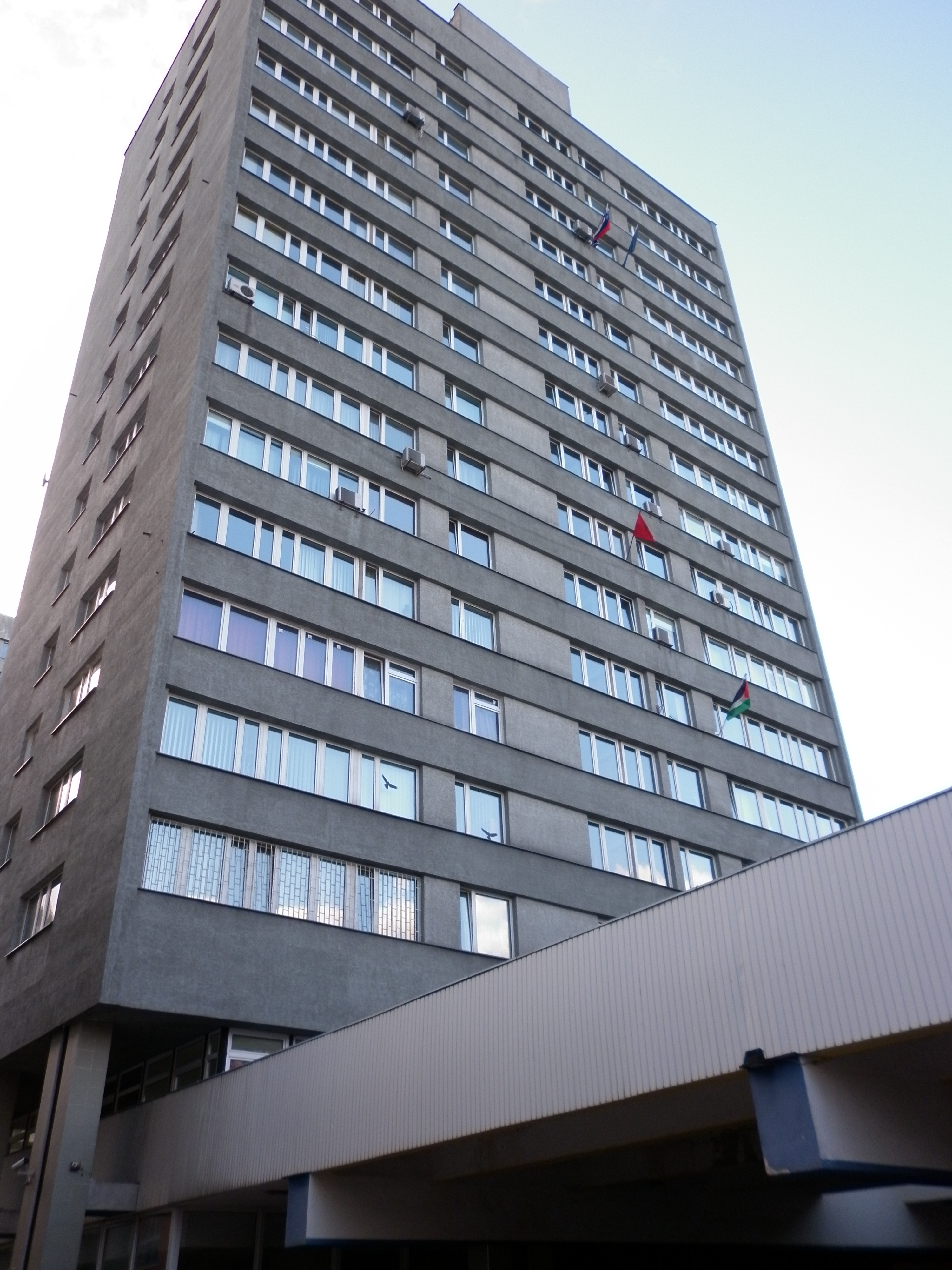 Ambasady Maroka Palestyny i Słowenii